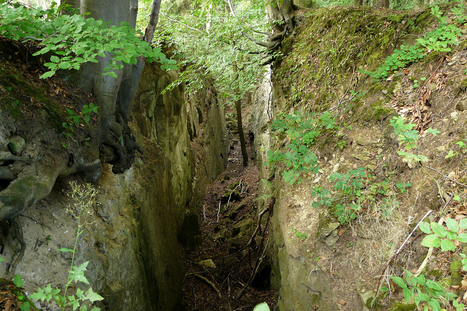 Malá Čertova zeď - průkop po odtěžené žíle